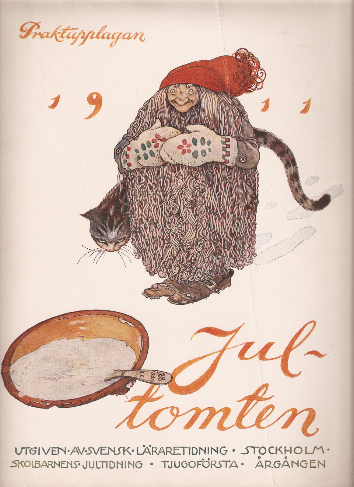 «Журнал Jultomten с иллюстрацией Йона Бауэра (1882-1918)»title QS:P1476,ru:"Журнал Jultomten с иллюстрацией Йона Бауэра (1882-1918)" label QS:Lru,"Журнал Jultomten с иллюстрацией Йона Бауэра (1882-1918)"